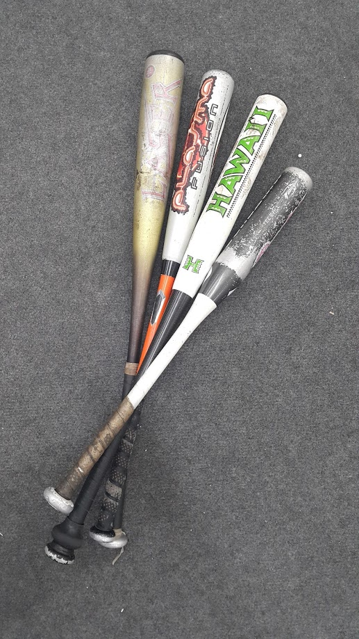 Алюминиевые бейсбольные биты